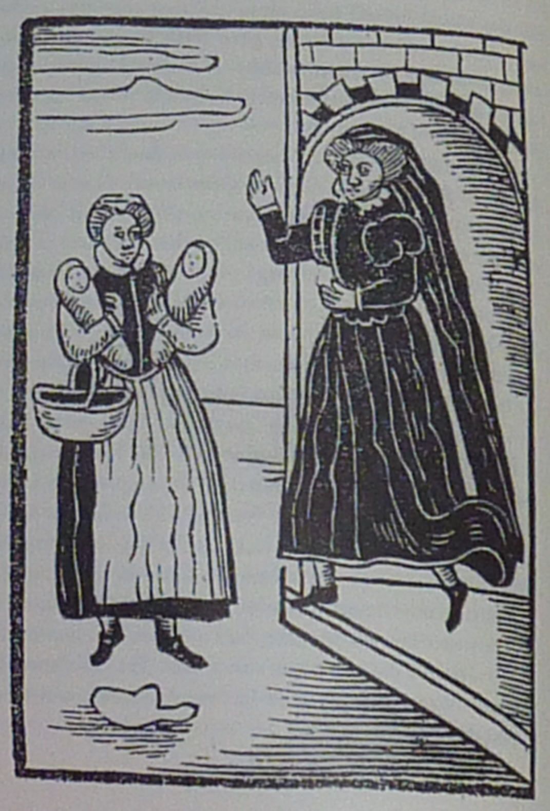 Beschimpfung der Bettlerin, zurückgehend auf die Legende von Margarete von Henneberg, Lamenting Lady